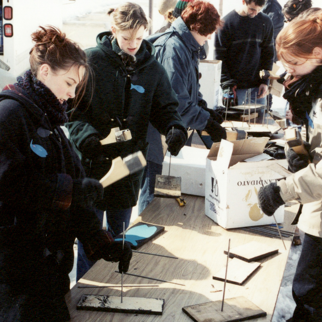 À Québec (Québec, Canada)en 2002, au Parc de la jeunesse, 5 000 tacons bleus ont été installés pour former une flèche indiquant la direction du Saguenay—Lac-Saint au jeunes jeannois et saguenéens qui ont migré vers les grands centres. Cette exode massive a provoqué une régression de la population sur cette région. Cette action performative conçue et produite par le collectif Interaction Qui avec la collaboration des étudiants (tes) en Arts et Technologie Informatisée du Collège d'Alma se voulait un cri d'alarme et d'espoir.